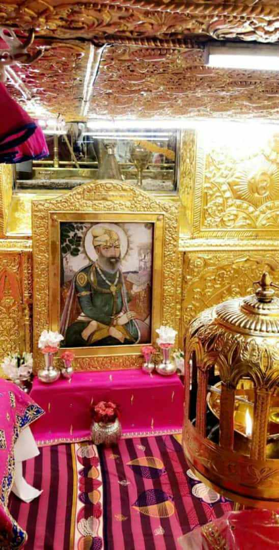 Acèh: ਗੁਰੂ ਤੇਗ ਬਹਾਦਰ ਜੀ